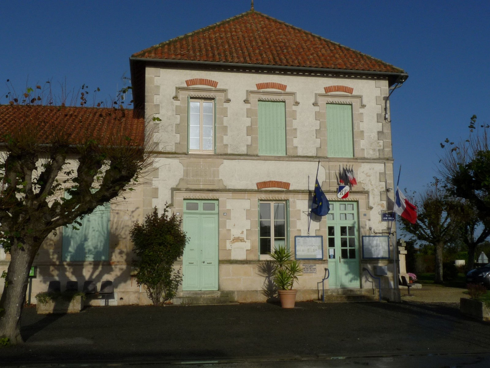 Mairie de Clion, Charente-Maritime, France